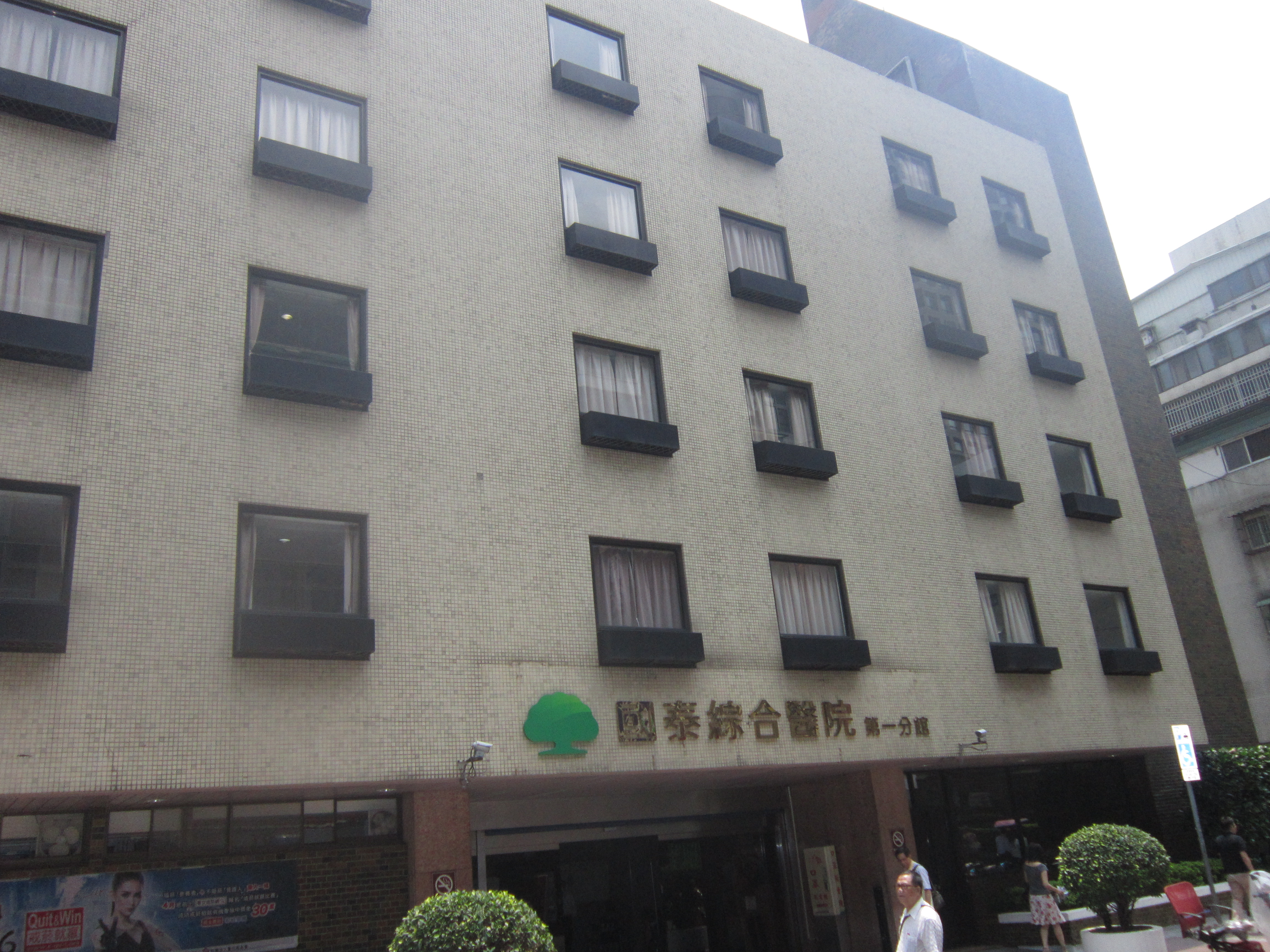 國泰綜合醫院總院第一分館。